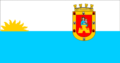 Bandera de Trujillo (Honduras) Imagen realizada por J. Ollé Véase también: Wikipedia:Autorizaciones/Banderas de Jaume Ollé Categoría:Banderas (imagen)